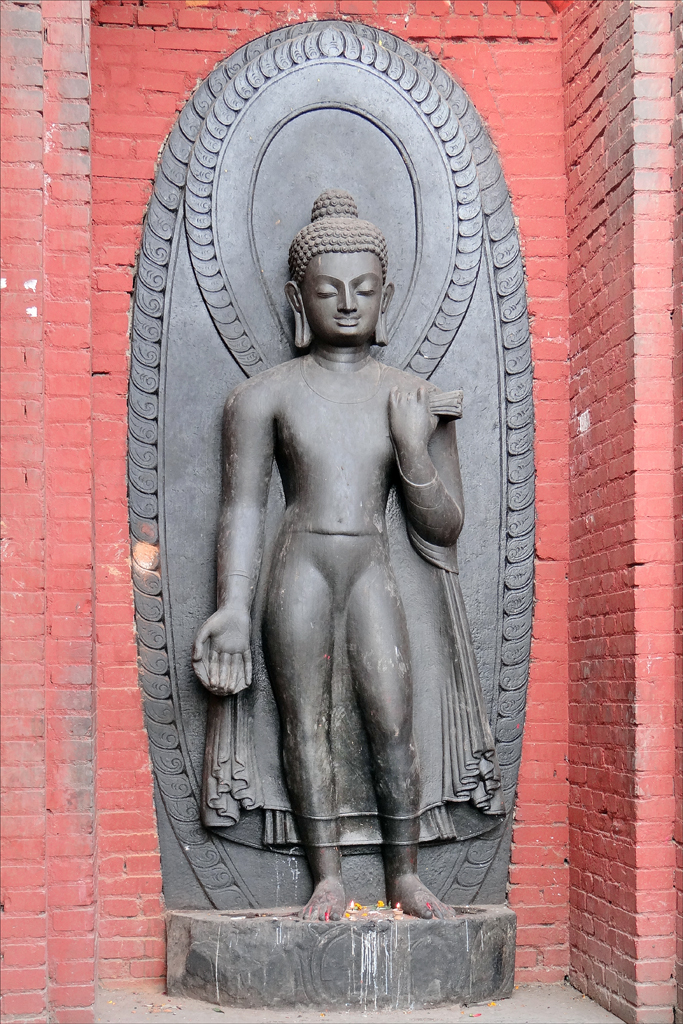 Dipankara (celui qui apporte la lumière) est l'un des Bouddhas du passé Cette statue noire datant du VIIème siècle est dans une niche sur la plateforme du grand Stupa. Le temple bouddhique de Swayambhunath est un site classé au patrimoine mondial de l'UNESCO. Situé sur une colline, il domine la ville de Katmandou et il est célèbre pour son grand stupa dont le bloc cubique qui soutient la flèche est orné du regard du Bouddha sur chacune de ses faces. Le grand stupa est entouré de nombreux monuments, de stupas secondaires et de sculptures religieuses.